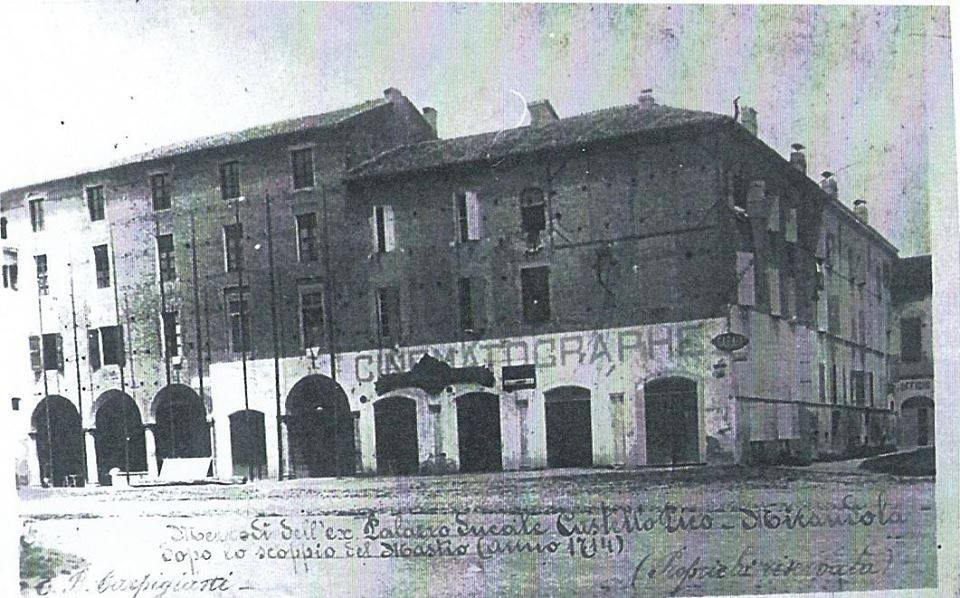 I resti del Palazzo Ducale del castello di Mirandola (inizio XX secolo)